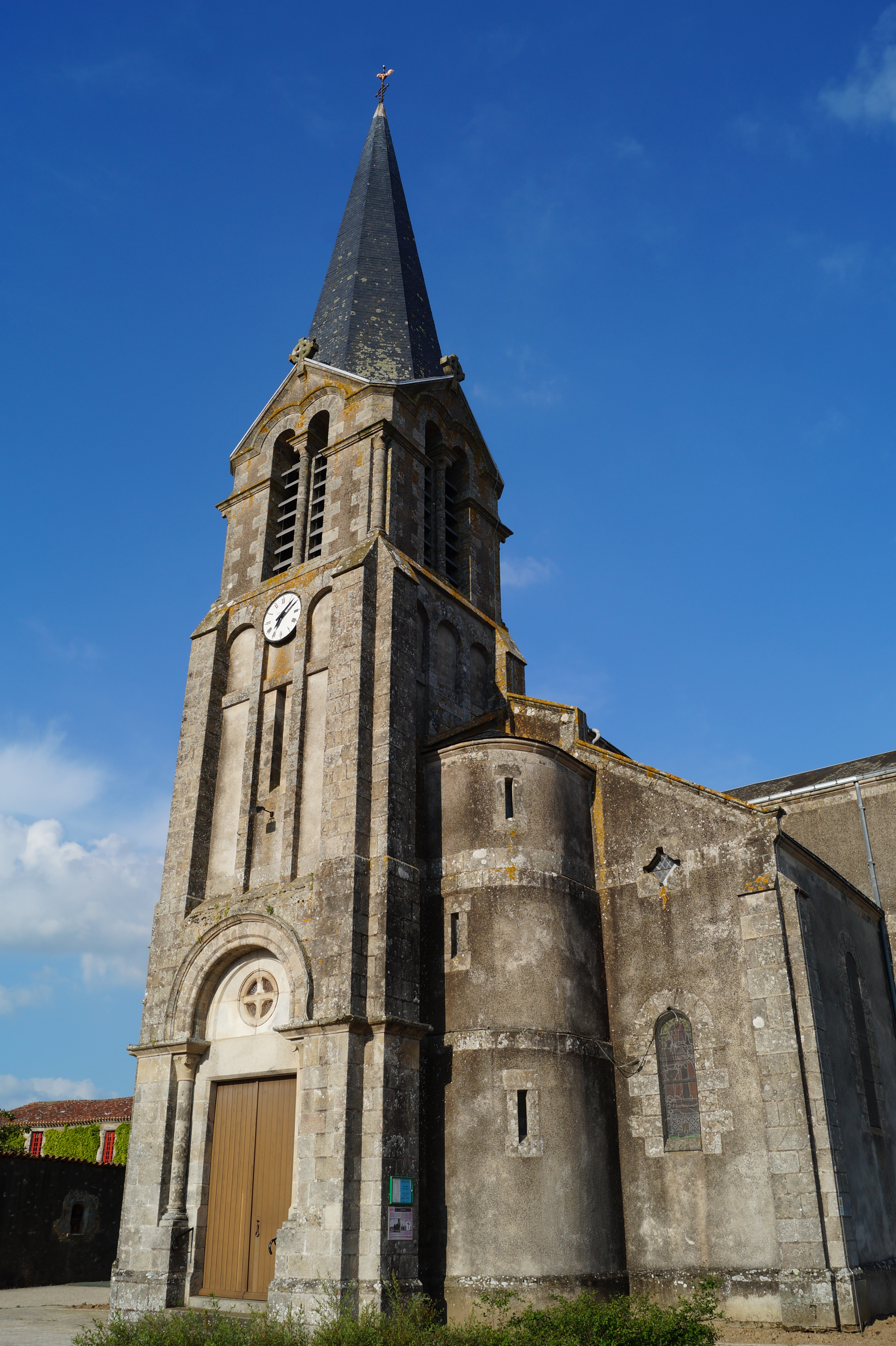 L’église Saint-Paul de Saint-Paul-Mont-Penit.